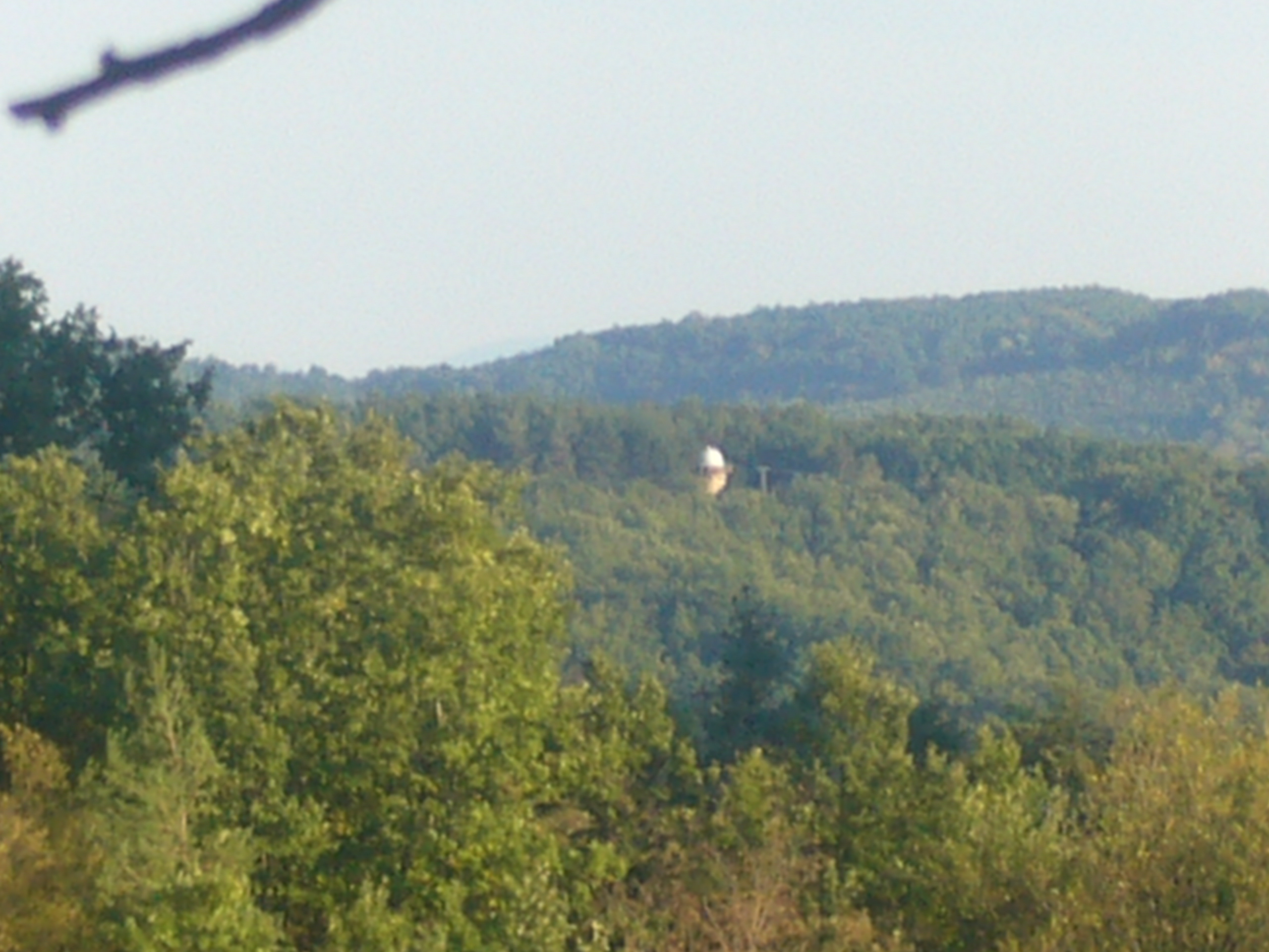 A salgótarjáni obszervatórium látképe a Karancsról